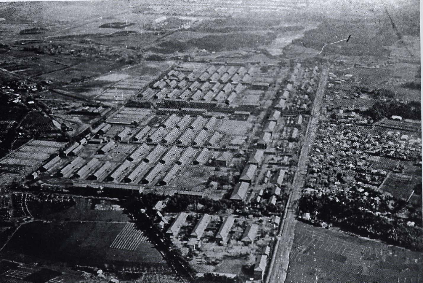 習志野騎兵旅団全景。一番手前は陸軍病院（現在は済生会病院）隣のブロックが騎兵13・14（現在は東邦・日大生産校舎）、街道を挟んだ奥が騎兵15・16連隊（現在は東邦高校）。さらにその奥、谷向こうに見えるのが高津廠舎。